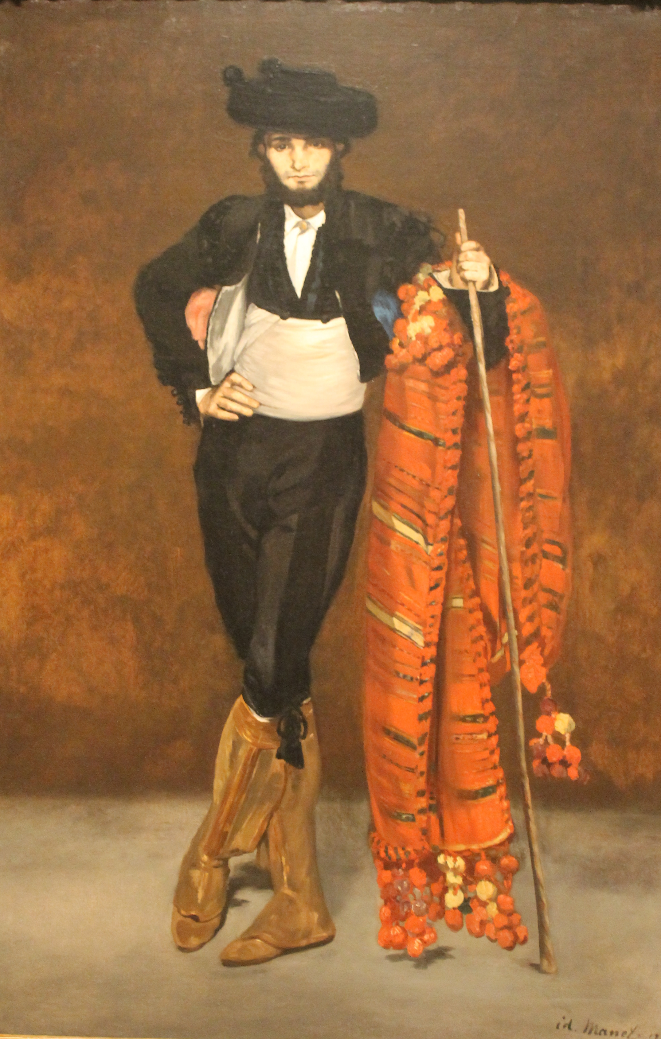 Joven vestido de majo (1863), de Édouard Manet. Óleo / tela. Museo Metropolitano de Arte de Nueva York. H.O. Havemeyer Collection.